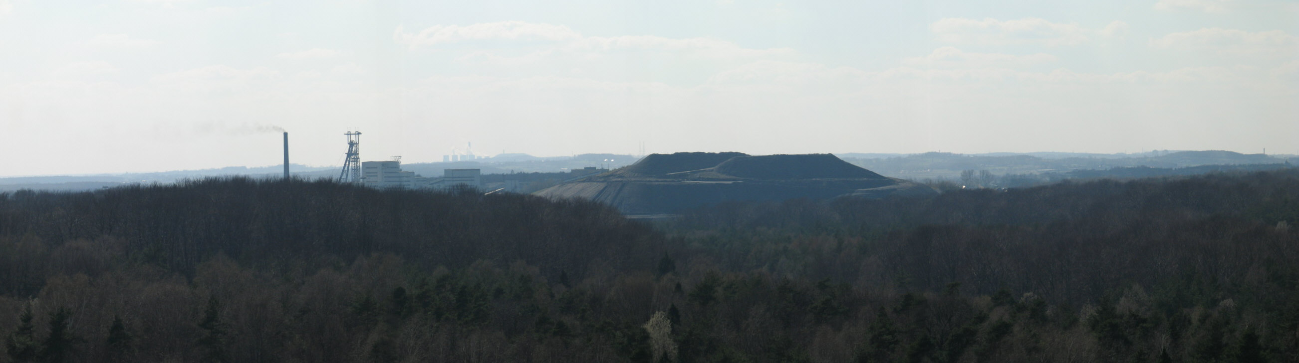 Halda w murckach, widok na kopalnie Boze Dary